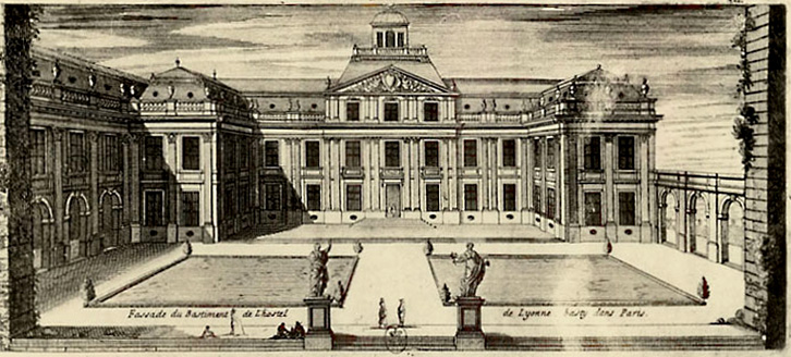 Hôtel de Lionne attribué par Louis XV à son contrôleur général des Finances, François-Marie Peyrenc de Moras, en 1756